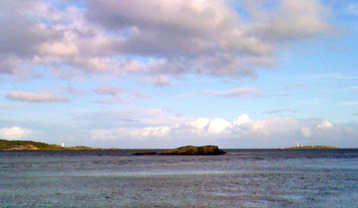 Utsikt mot Store og Lille Torungen fyr. Bildet er tatt på sørsida av Gjervoldsøy.